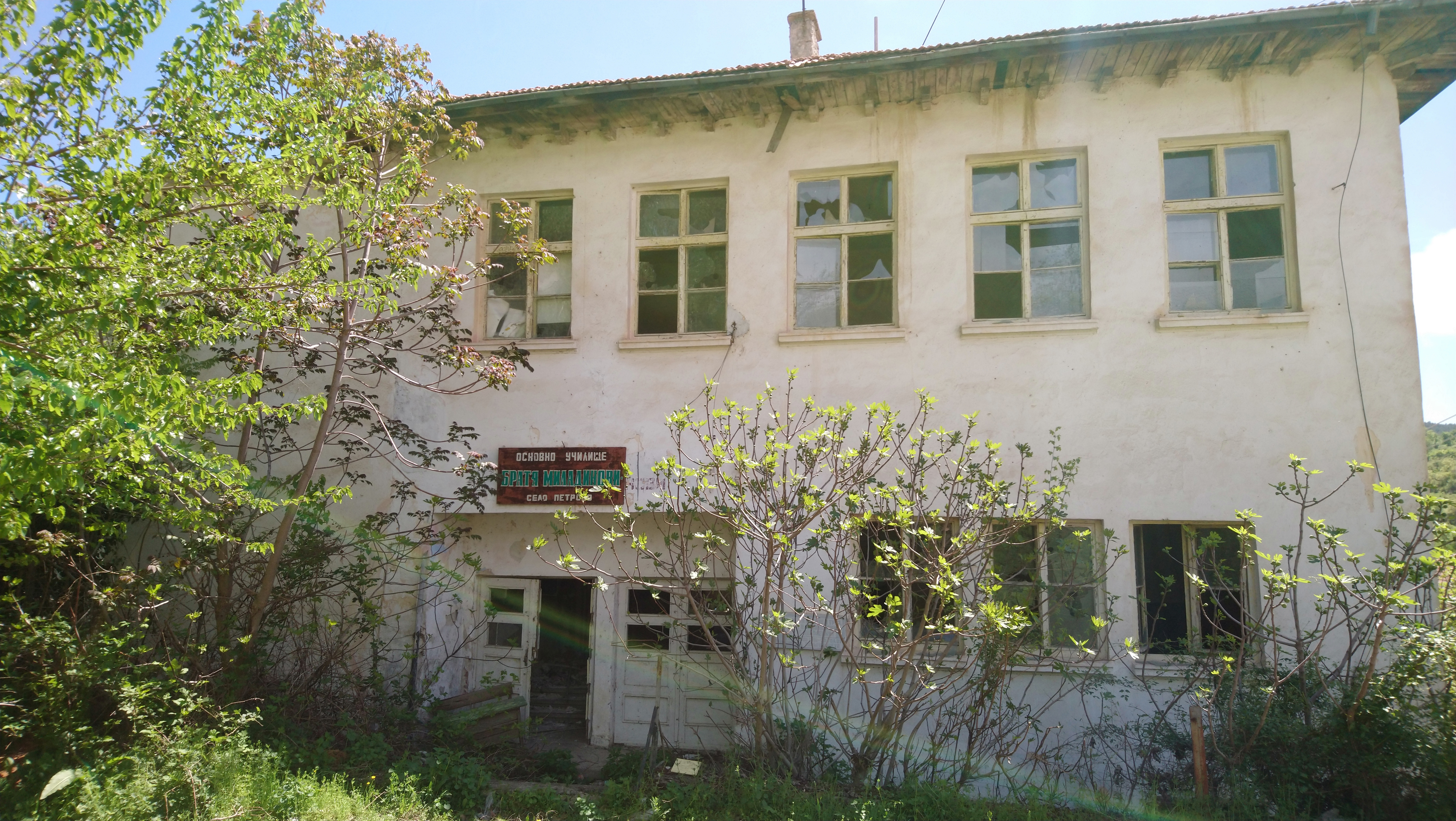 Основно училище Братя Миладинови, село Петрово, област Благоевград